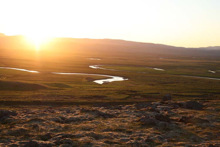 GBÞ